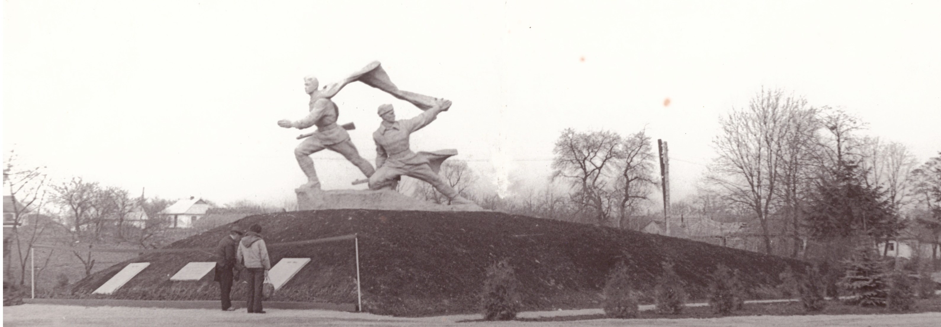 Пам’ятник загиблим воїнам-односельчанам в роки Великої Вітчизняної війни 1941-1945 р.р. С. Бохни Летичівський район Хмельницька область. 1980. Скульптор Таранченко В.О., архітектор Марчук М.Г. Литий бетон.